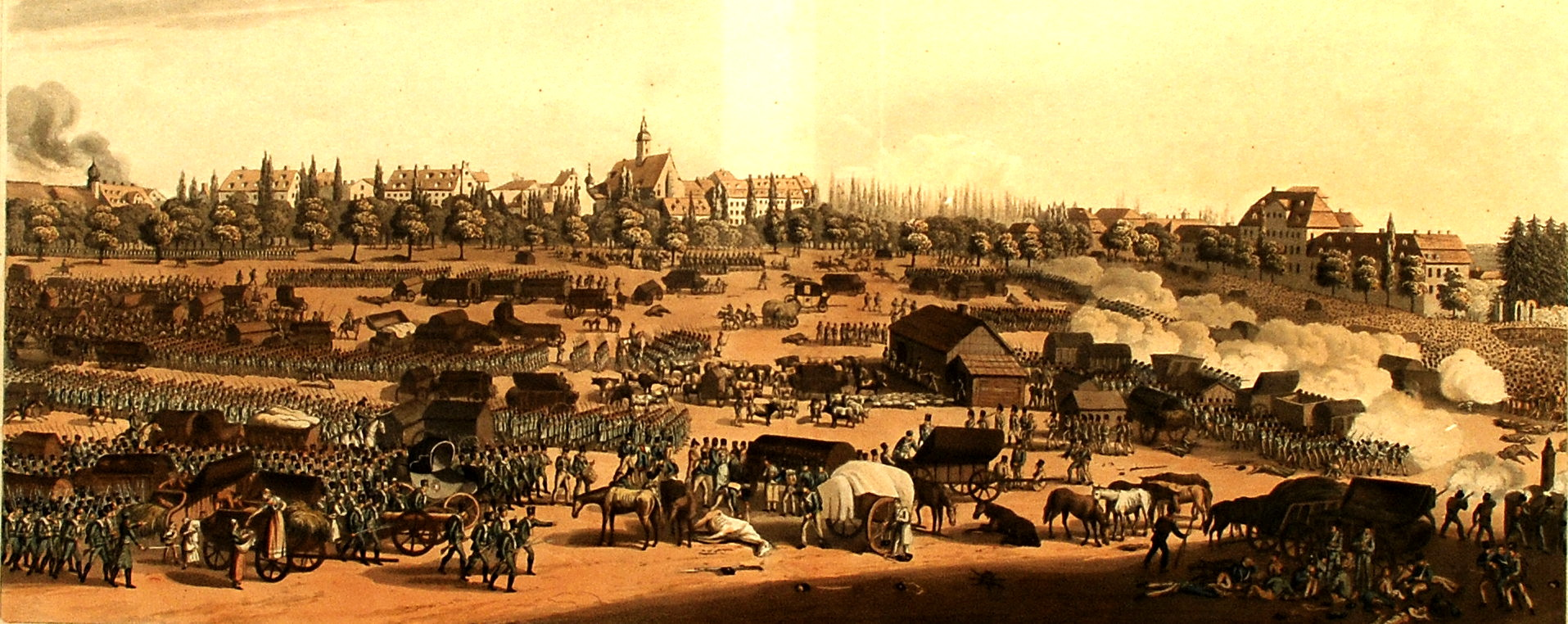 Der südliche Stadtrand von Leipzig am 19. Oktober 1813 Lithographie 28 x 52 cm von 1815 nach einem Aquarell von Christian Gottfried Heinrich Geißler (* 26 .06. 1770 Leipzig, † 27. 04. 1844 Leipzig). Dargestellt sind die heranrückenden Verbündeten. Geißler hatte die Szenerie aus einem Dachfenster, hinter dem er sich mit Matratzen verbarrikadiert hatte, skizziert und ein Aquarell gefertigt. Dieses war nach London gelangt, wo es als Vorlage dieser Lithographie diente. Das Original wurde in den neunziger Jahren des 19. Jahrhunderts vom Leipziger Stadtarchiv zurückgekauft. (Wustmann, Gustav: Bilderbuch aus der Geschichte der Stadt Leipzig. Leipzig: H. Zieger 1897, S. 159)